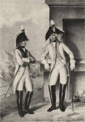 Генералы Харьковского и Малороссийского Кирасирских полков, 1797-1801. (в виц-мундире).